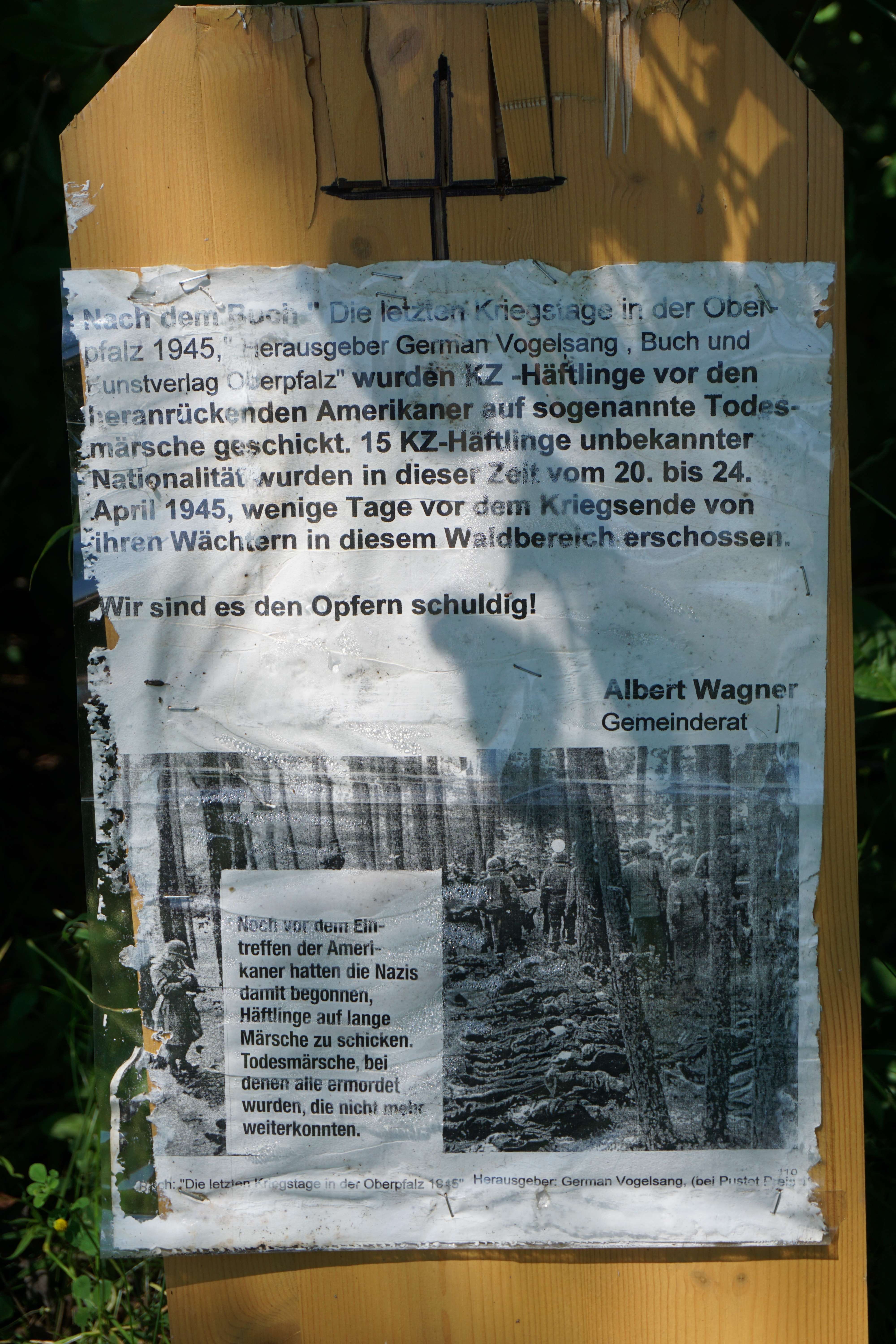 Todesmarsch-Mahnmal bei Bernhardswald. 15 KZ-Häftlinge wurden in dem Waldbereich bei Bernhardswald erschosssen